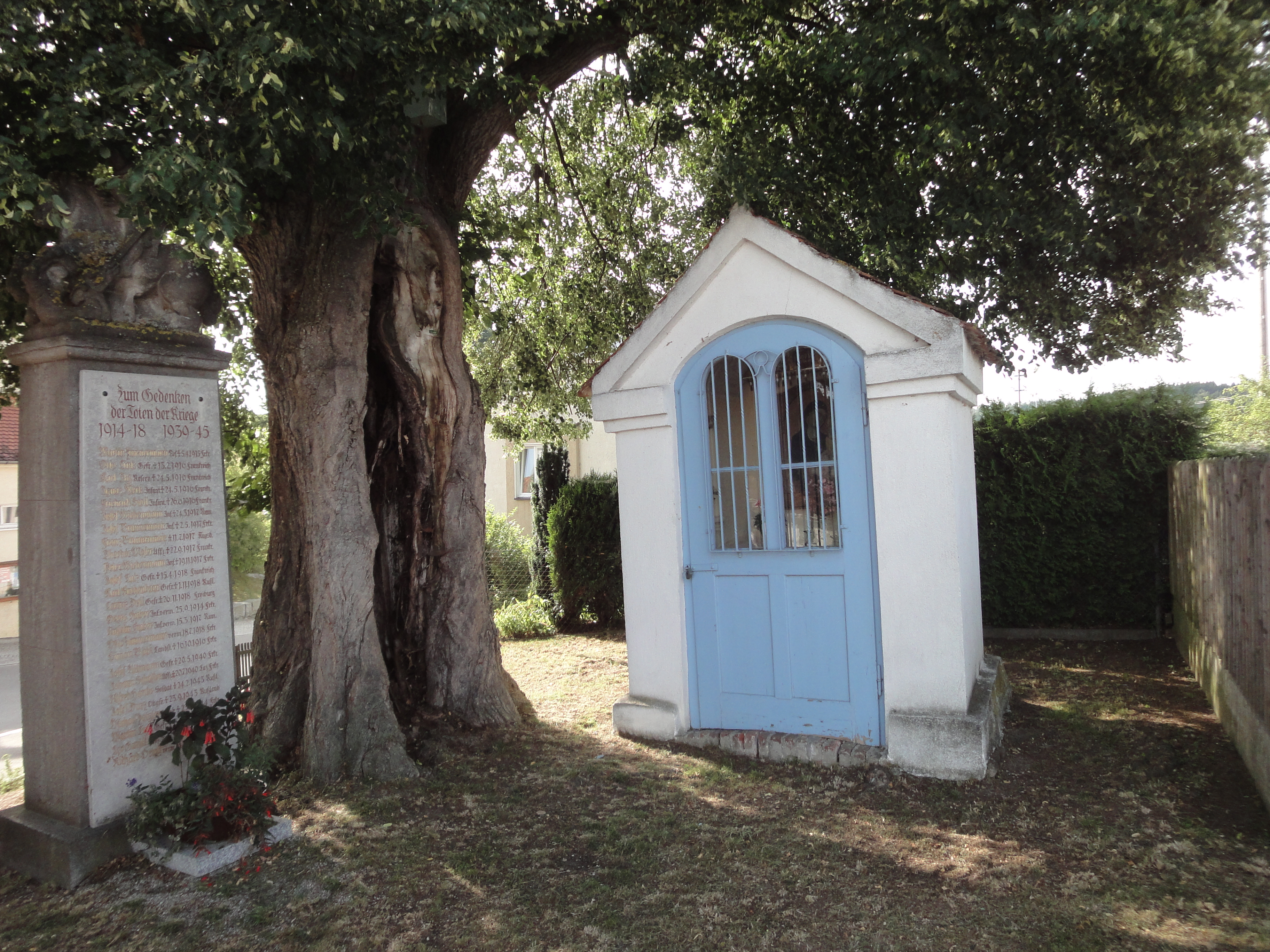 Ortskapelle Edenbergen, Gersthofen